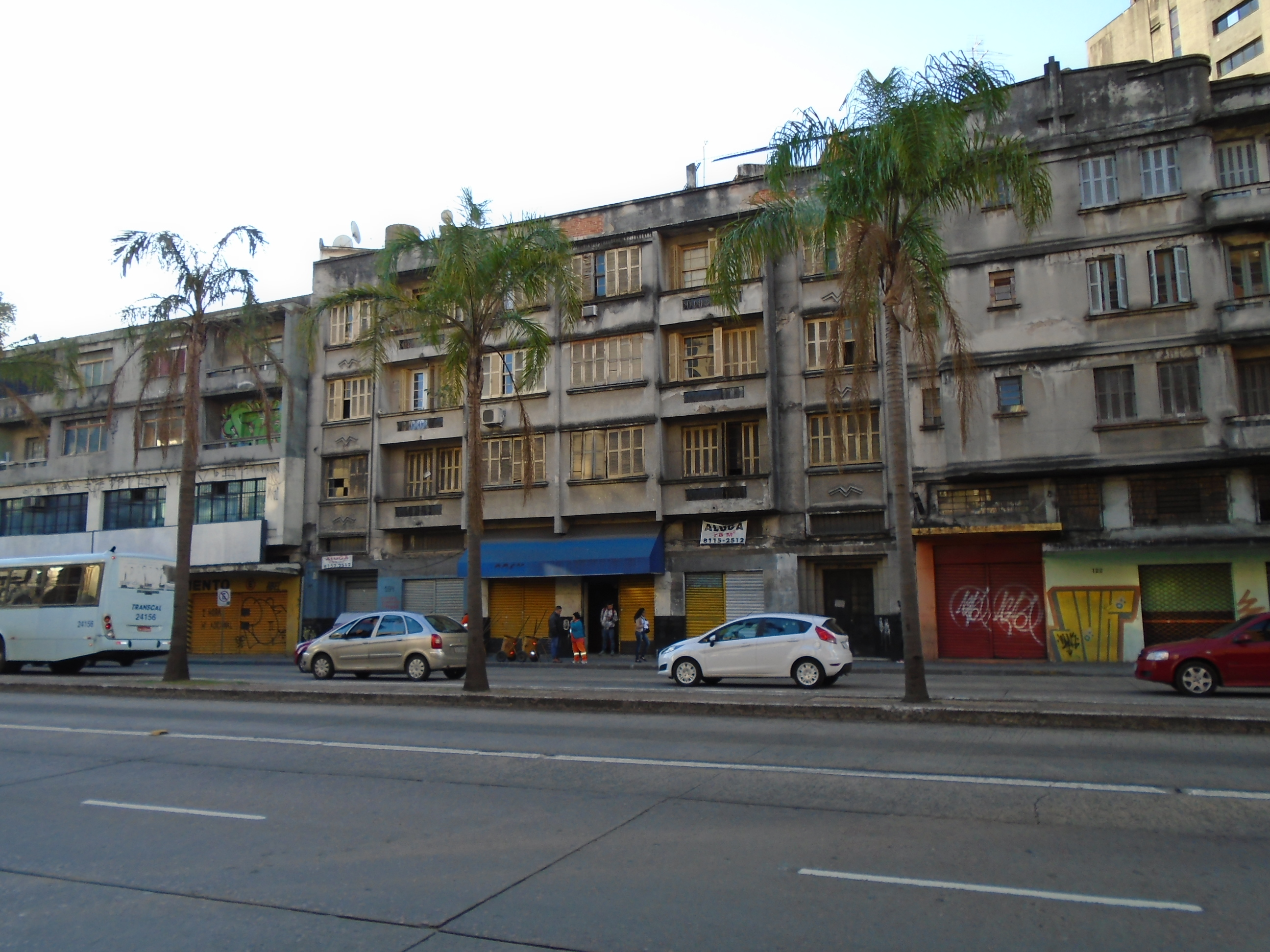 Avenida Farrapos, 114 (Porto Alegre, Brasil)